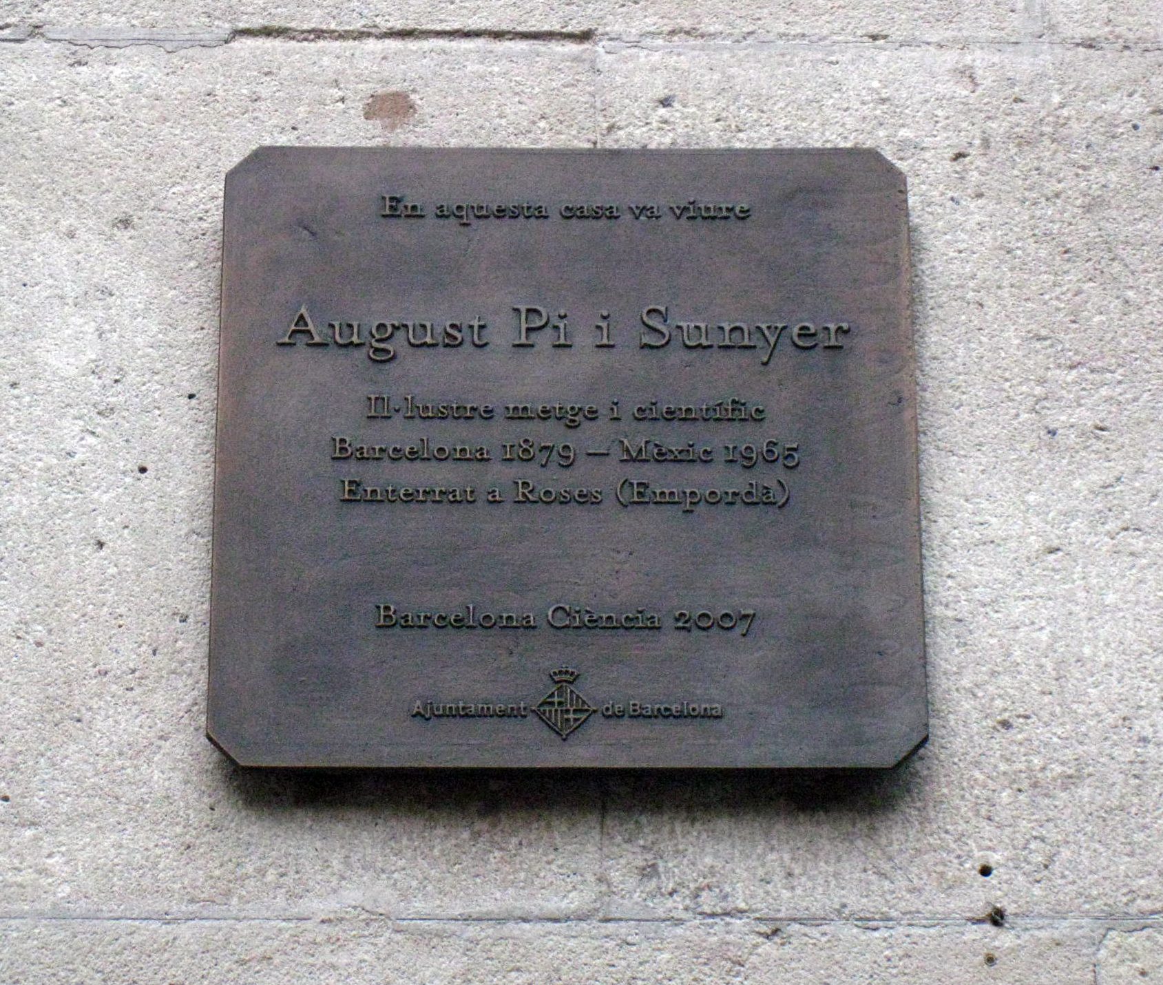 August Pi i Sunyer. C. Girona, 20 (Barcelona)